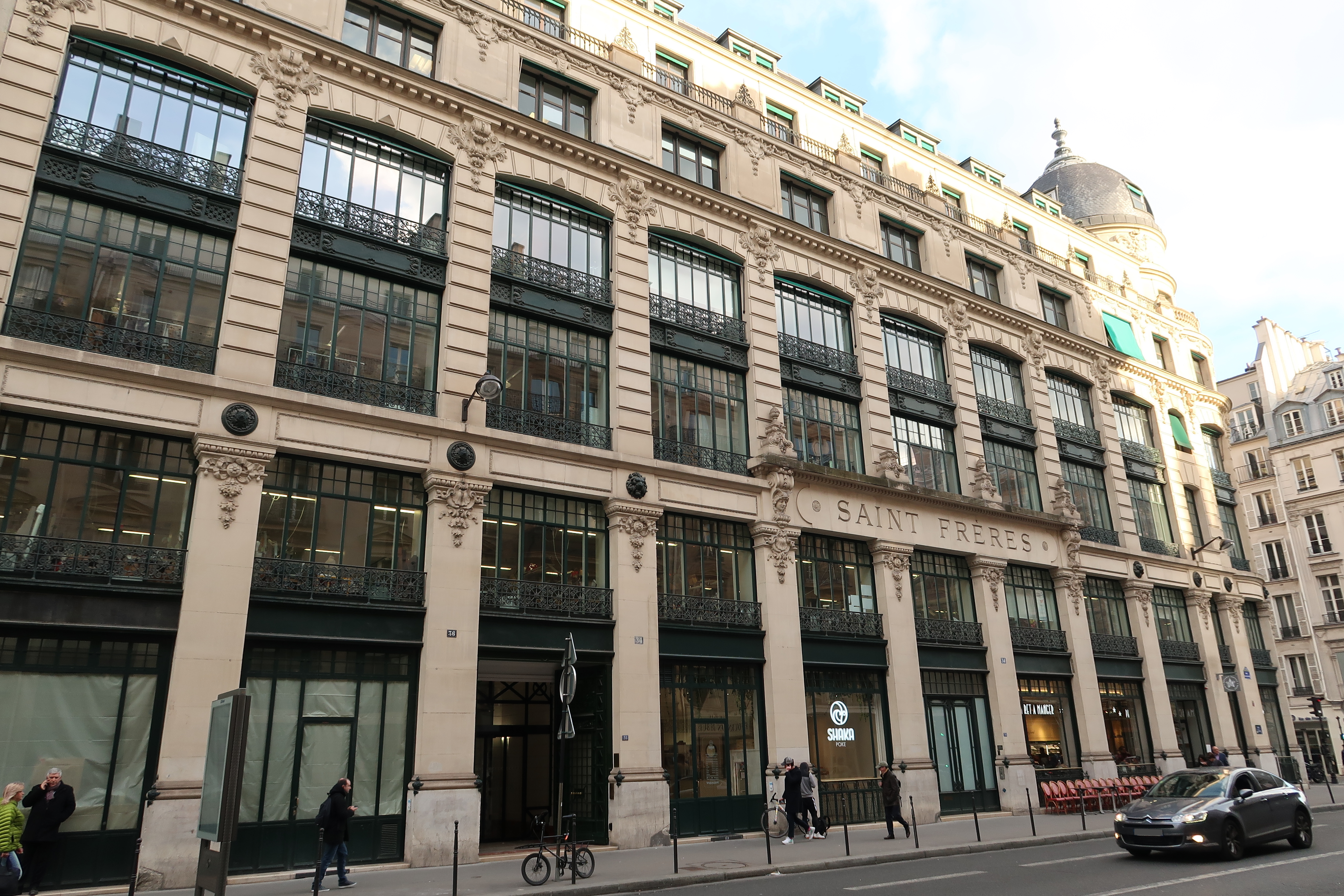 Ancien bâtiment Saint-Frères, 34 rue du Louvre (Paris, 1er).